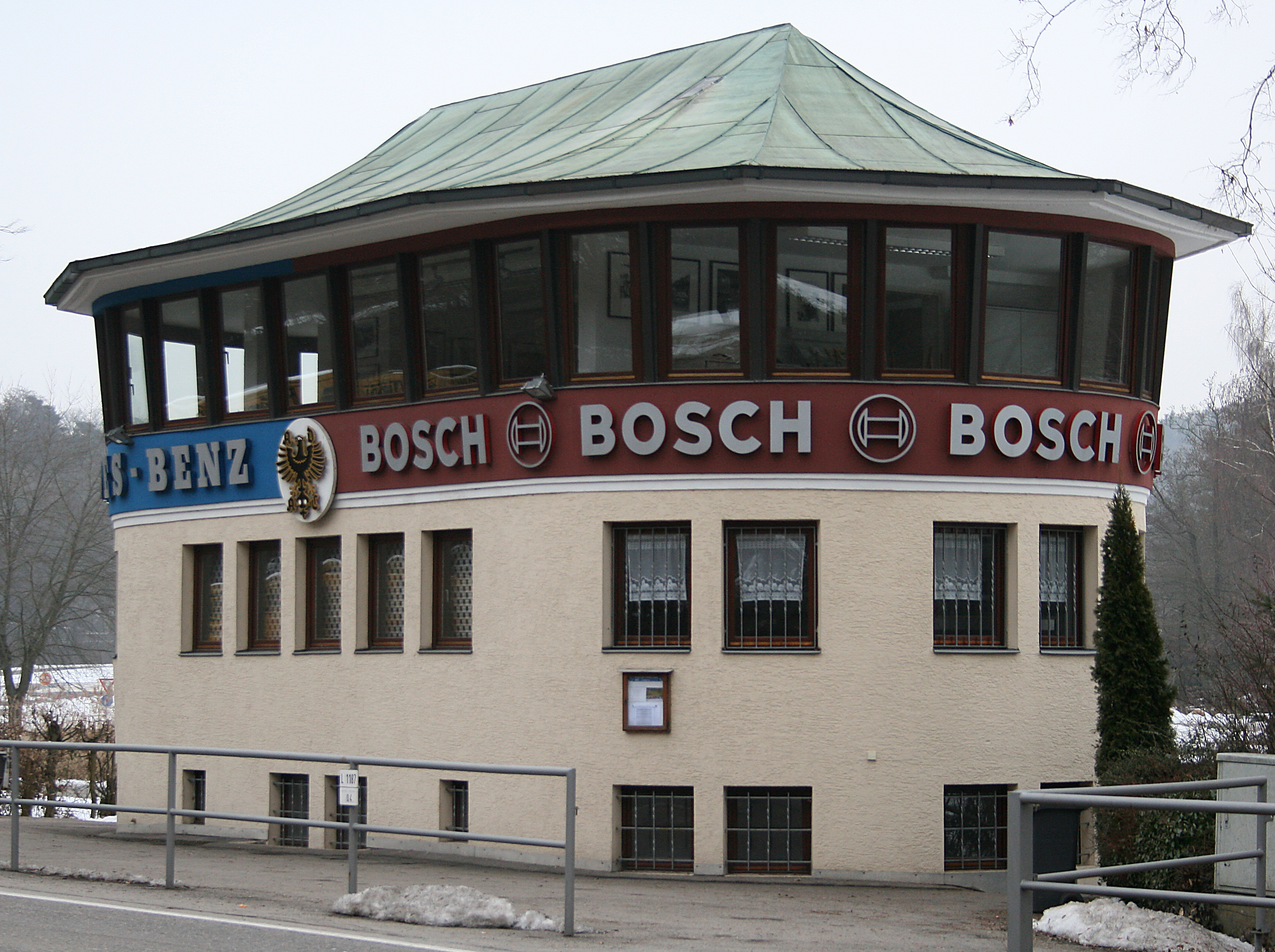 Der Start- und Zielturm der Solitude-Rennstrecke, einer ehemaligen Motorsport-Rennstrecke westlich von Stuttgart. Der Turm wurde 1956 errichtet. Seit 1981 dient er als Vereinsheim des Allgemeinen Motorrad-Sportclubs Leonberg e.V..